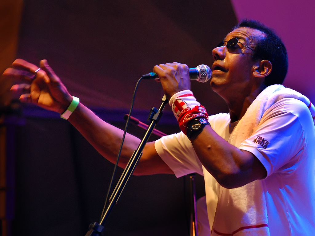 Foto: Natalia Bezerra.